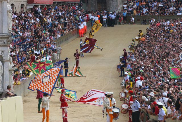 La "Sbandierata della Vittoria": nel rituale di ogni Palio precede di pochi minuti l'uscita dei fantini dall'Entrone e quindi le operazioni che preludono alla partenza.